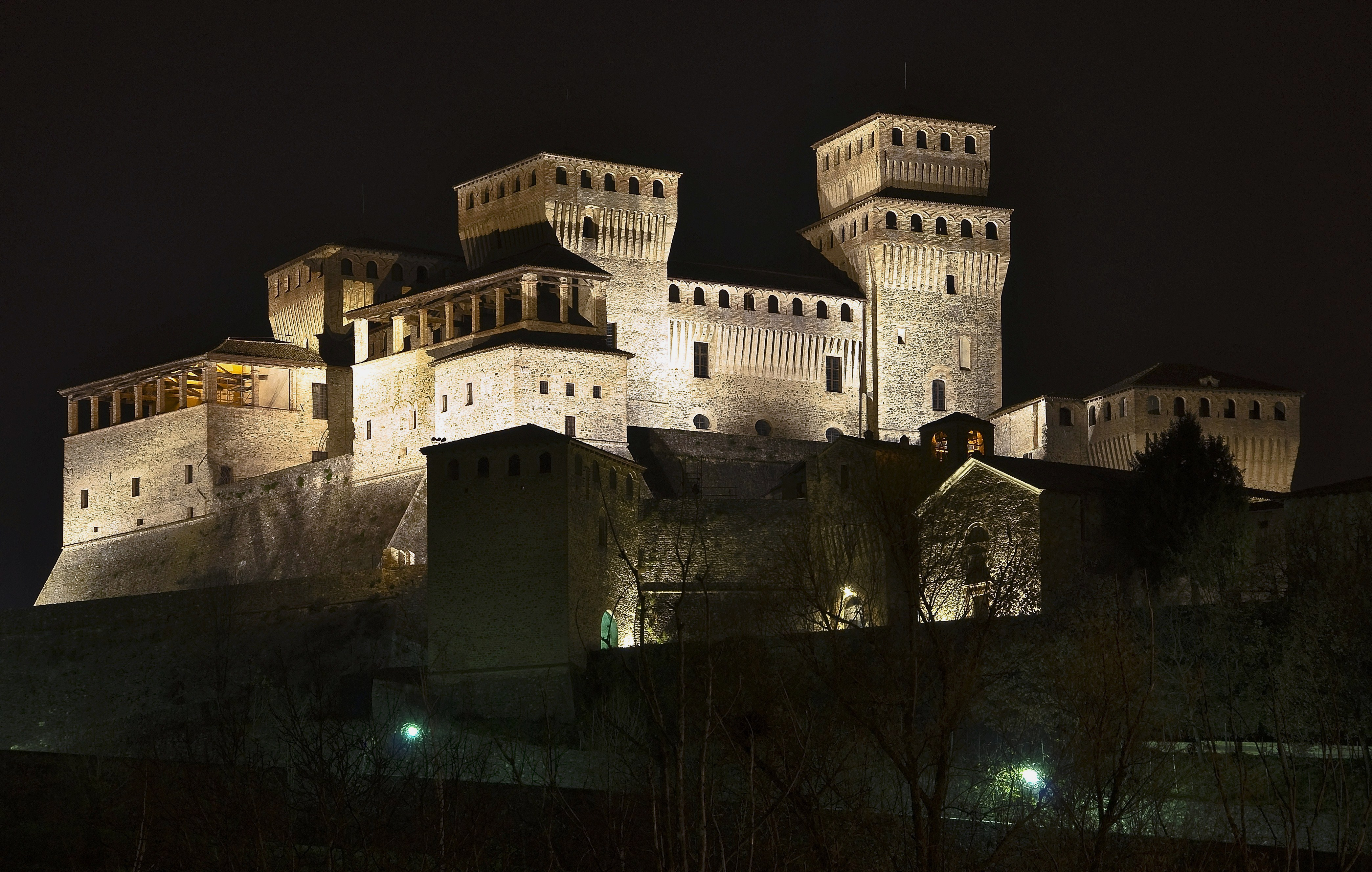 Langhirano, Castello di Torrechiara - MIBAC This is a photo of a monument which is part of cultural heritage of Italy.